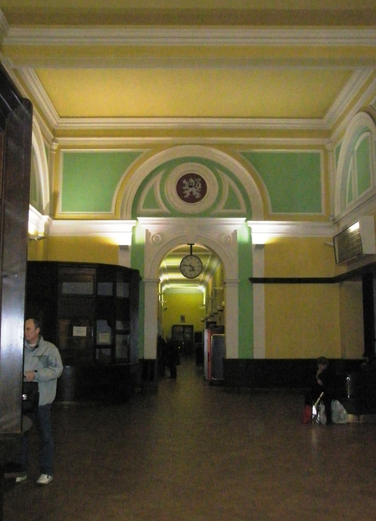 Railway station in Český Těšín, Czech republic